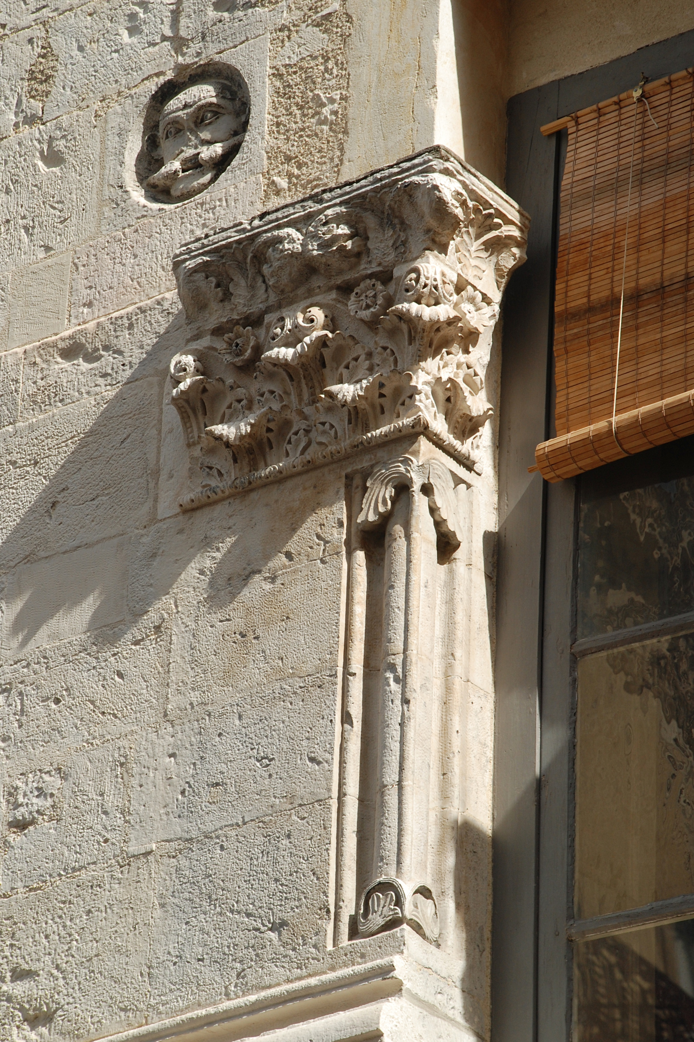 France - Provence - Maison romane de Nîmes